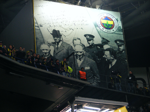 Şükrü Saracoğlu Atatürk Resmi